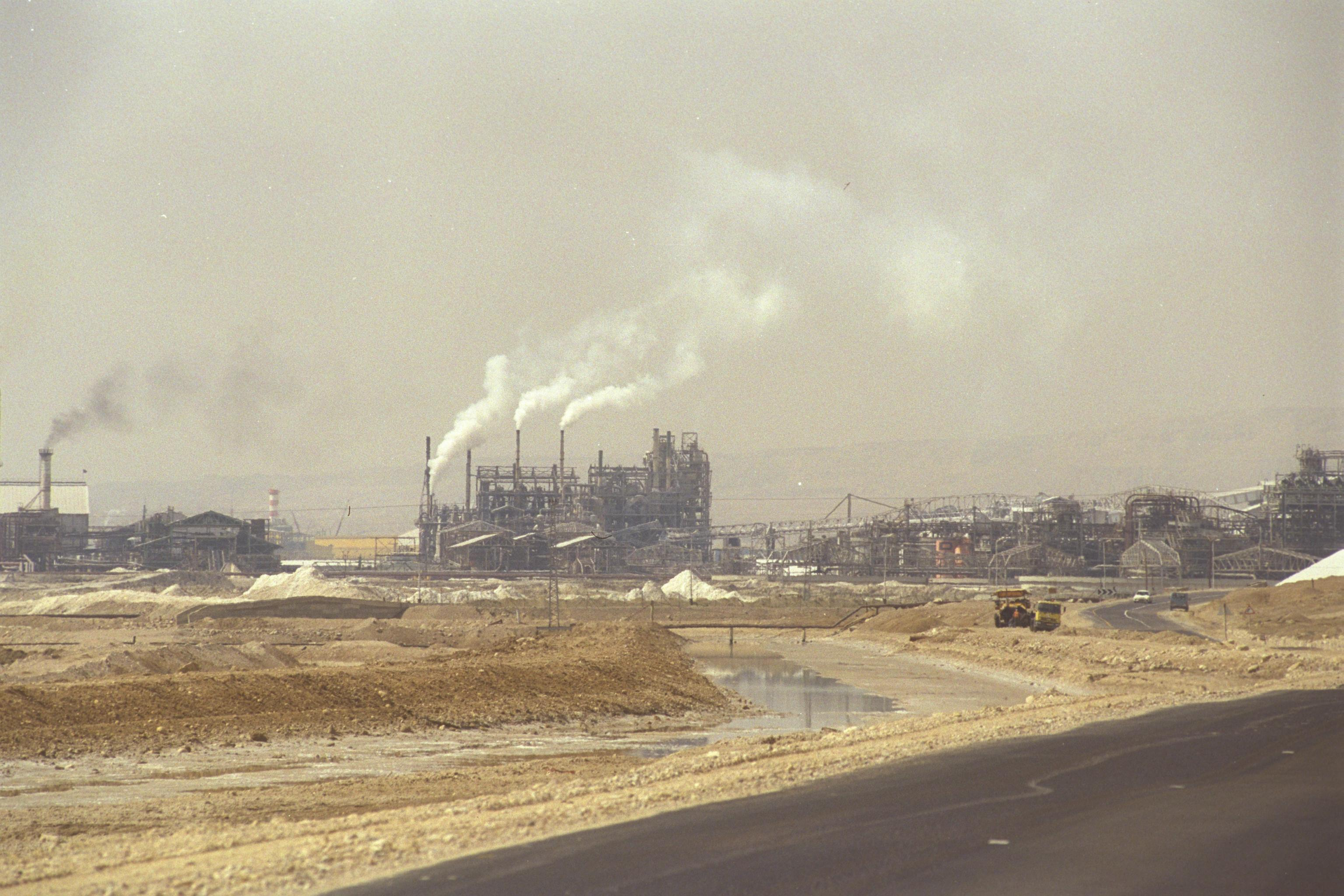 The Dead Sea works in Sodom. צילום כללי של מפעלי ים המלח בסדום. Photo: SAAR YAACOV, GPO, 03/22/1996.